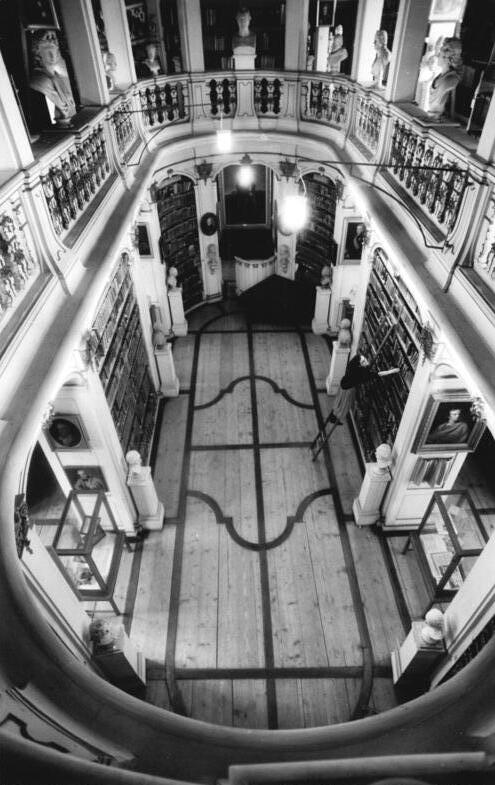 Weimar, Bibliothek, Innenansicht ADN-Ralf Hirschberger 17.10.90 Weimar: Die Zentralbibliothek der deutschen Klassik ging 1969 aus der Vereinigung der ehemaligen Landesbibliothek mit der Bibliothek der Forschungsstätten in Weimar hervor. Ihre Entwicklung reicht einerseits für die fürstlichen Sammlungen bis in das Jahr 1691 zurück, für die Klassik-Bestände andererseits bis in das Jahr 1885. Zu denBüchersammlungen gehören rund 790.000 Bände. Geschichtlicher Rückblick heißt für die Weimarische Bibliothek 400 Jahre Baugeschichte des Hauses und 300 Jahre bibliothekarische Existenz. Blick in den Rokokosaal.